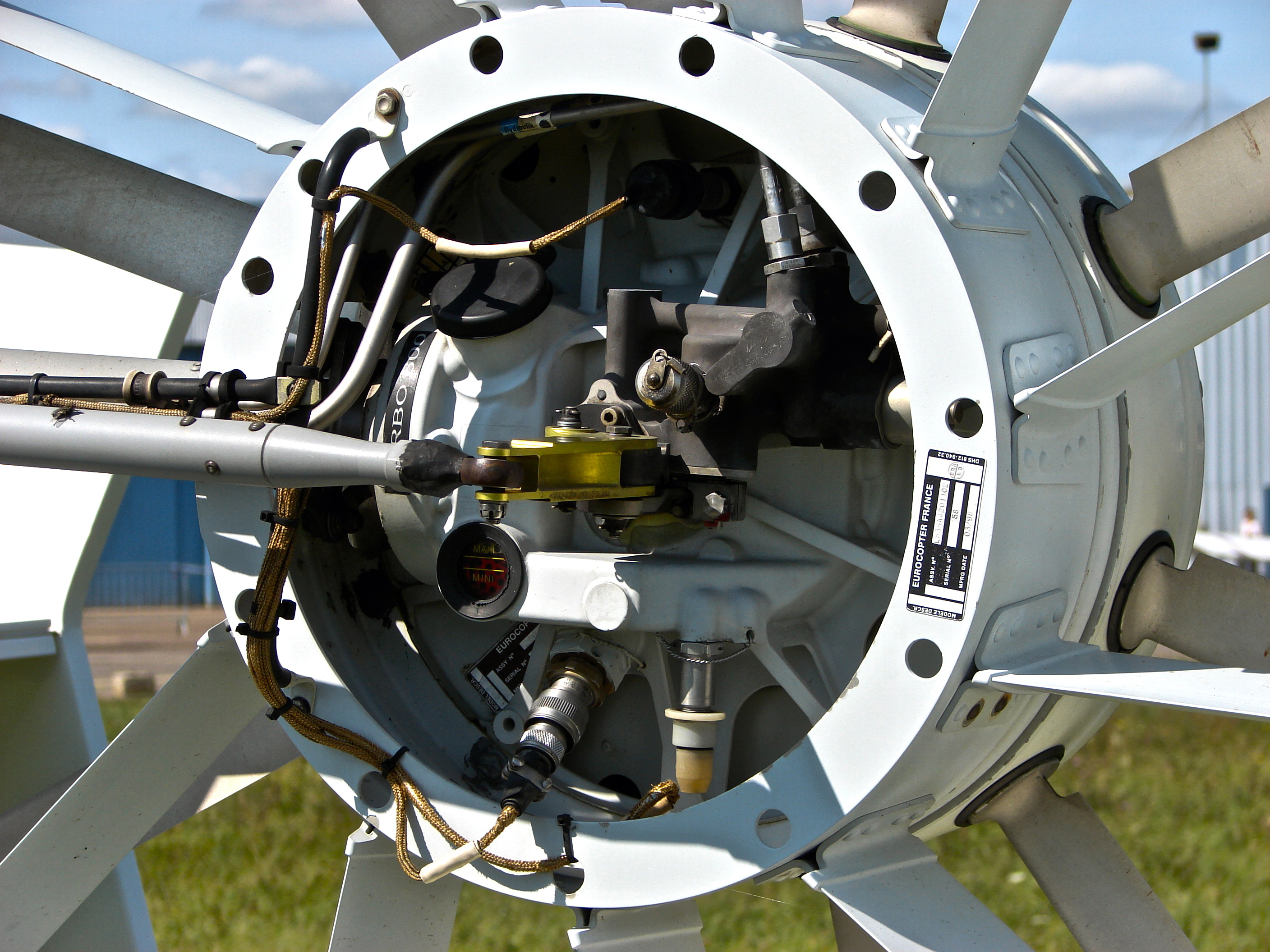 SAMU (Helicopteres de France) F-GNLO (cn 0005) Nancy - Essey (ENC / LFSN)